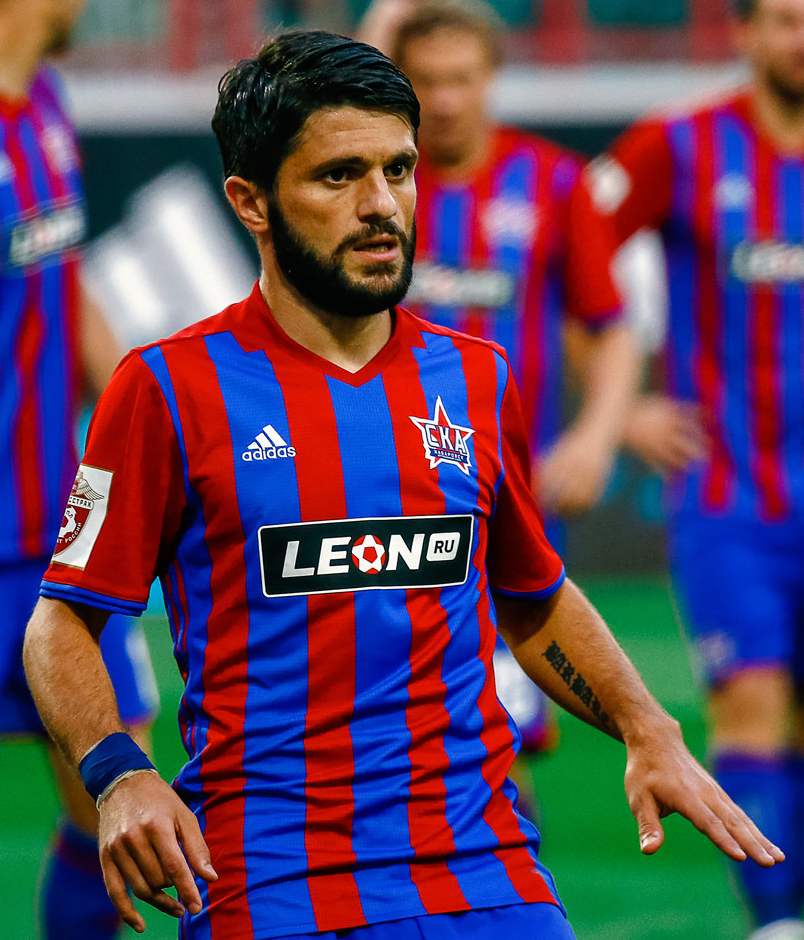 «Локомотив» - «СКА-Хабаровск»